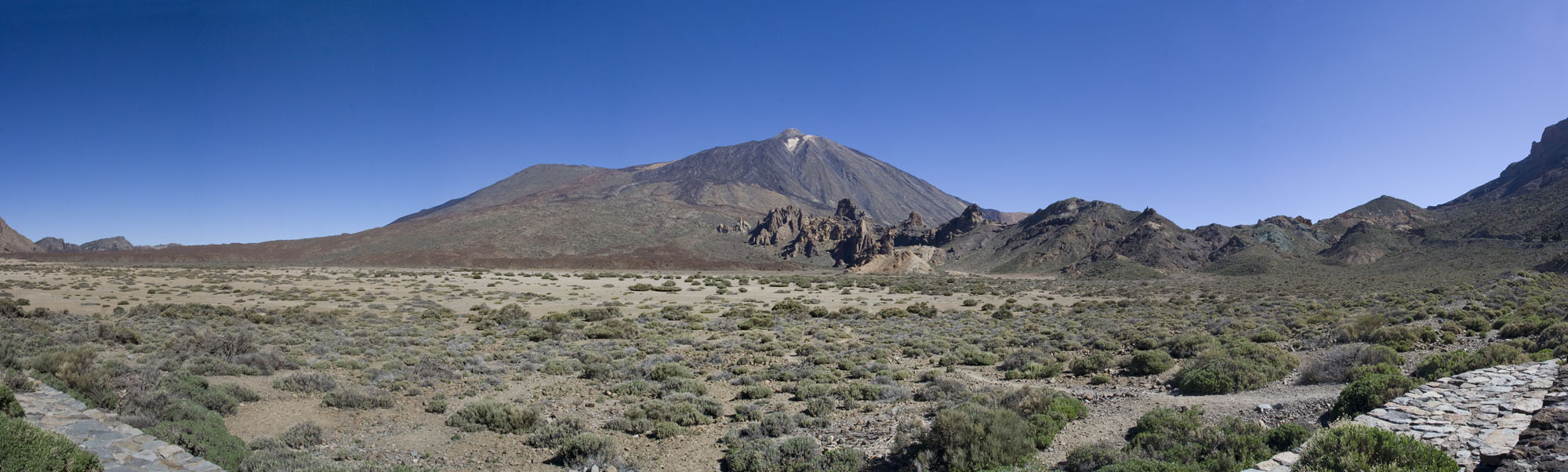 Teide Nationalpark, Pico del Teide, Tenerife